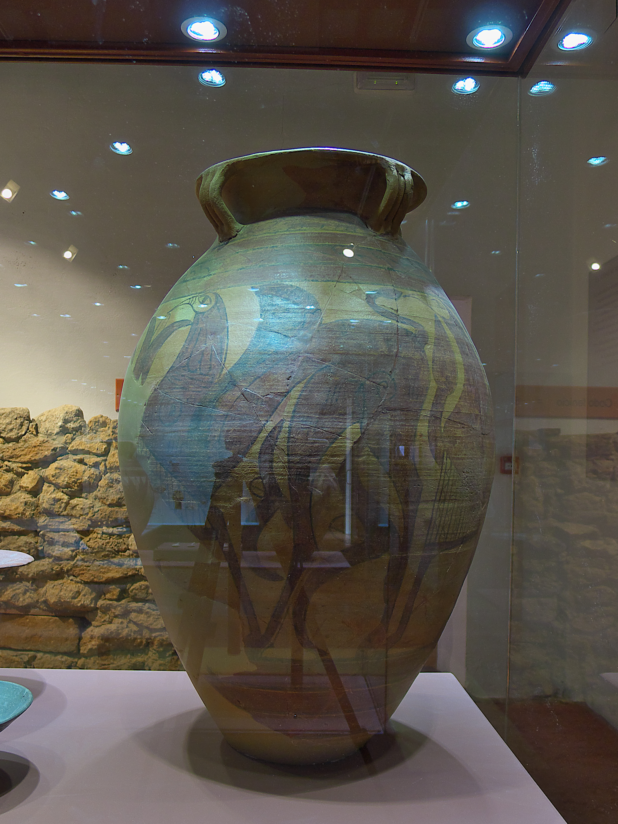 Una de las cerámicas orientalizante más interesante del arte tartésico (s. VII a.C). Cuatro seres fantásticos con cabezas y alas de ave, cuerpos de ciervo y rabos de toro, procesionan entre adornos florales.